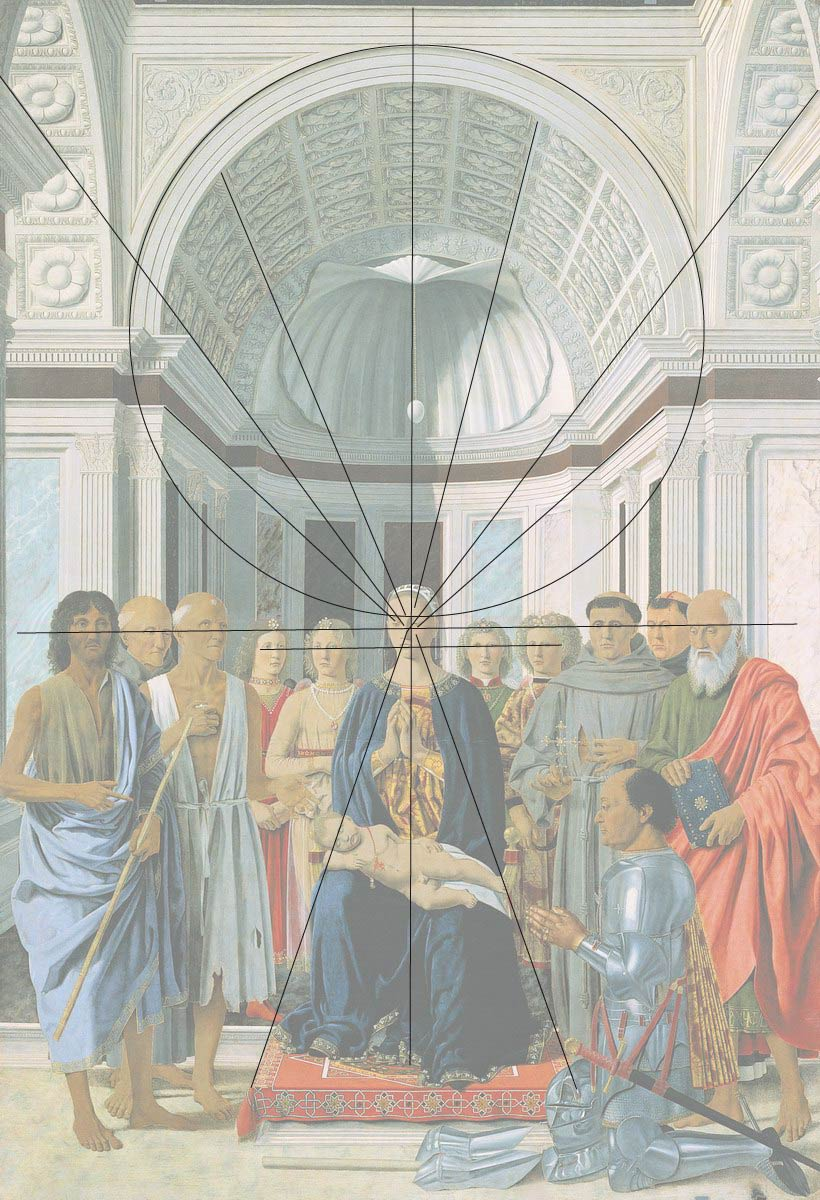 Lignes de forces perspective dans le tableau La Conversation Sacrée de Piero de la Francesca